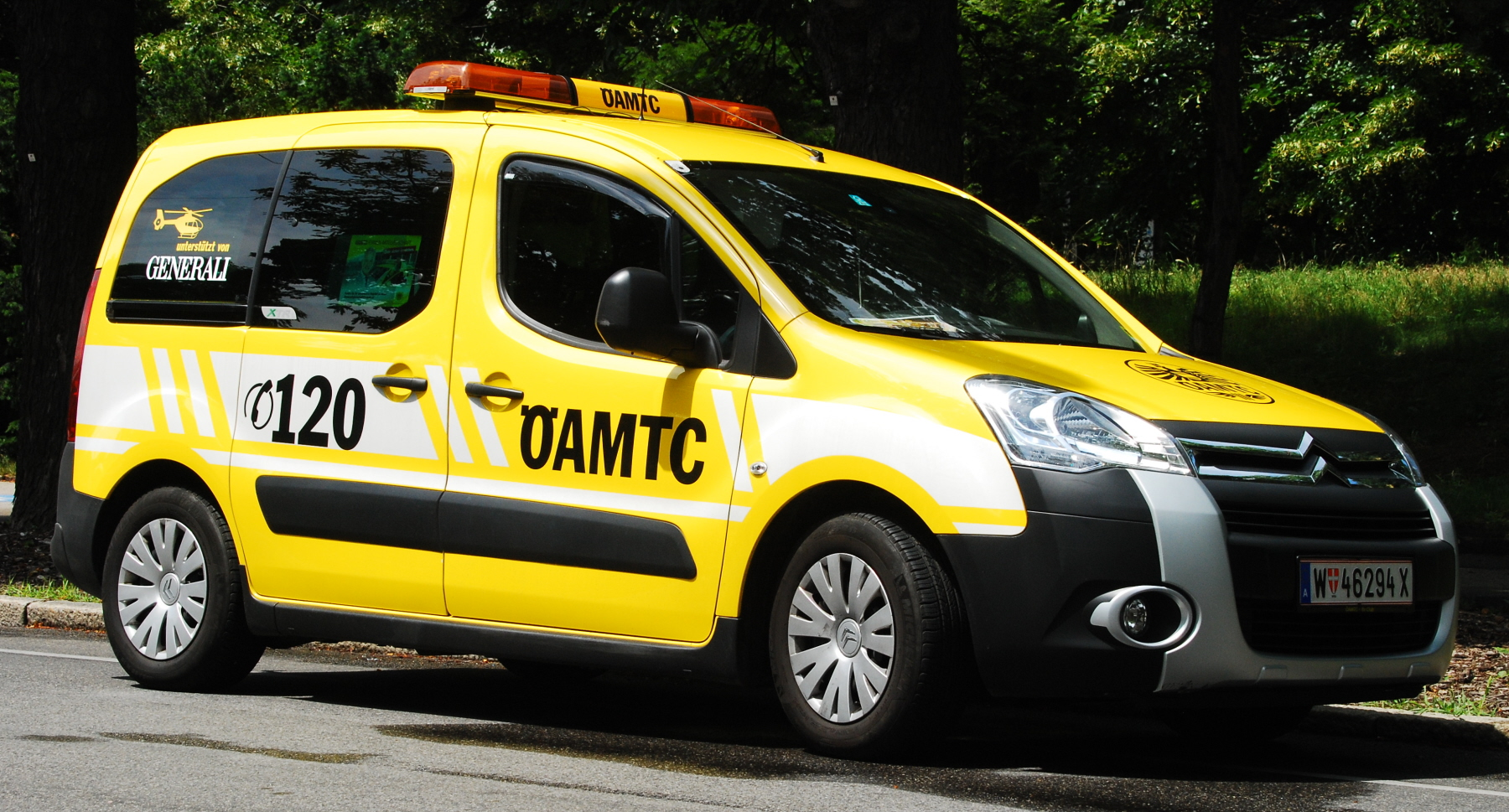 ÖAMTC-Pannenwagen anlässlich eines Oldtimer-Treffens auf der Mariahilfer Straße vor dem Technischen Museum in Wien.